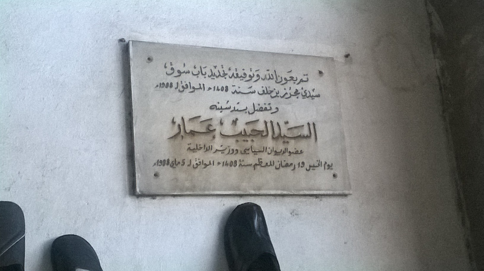 Bab Souika باب سويقة